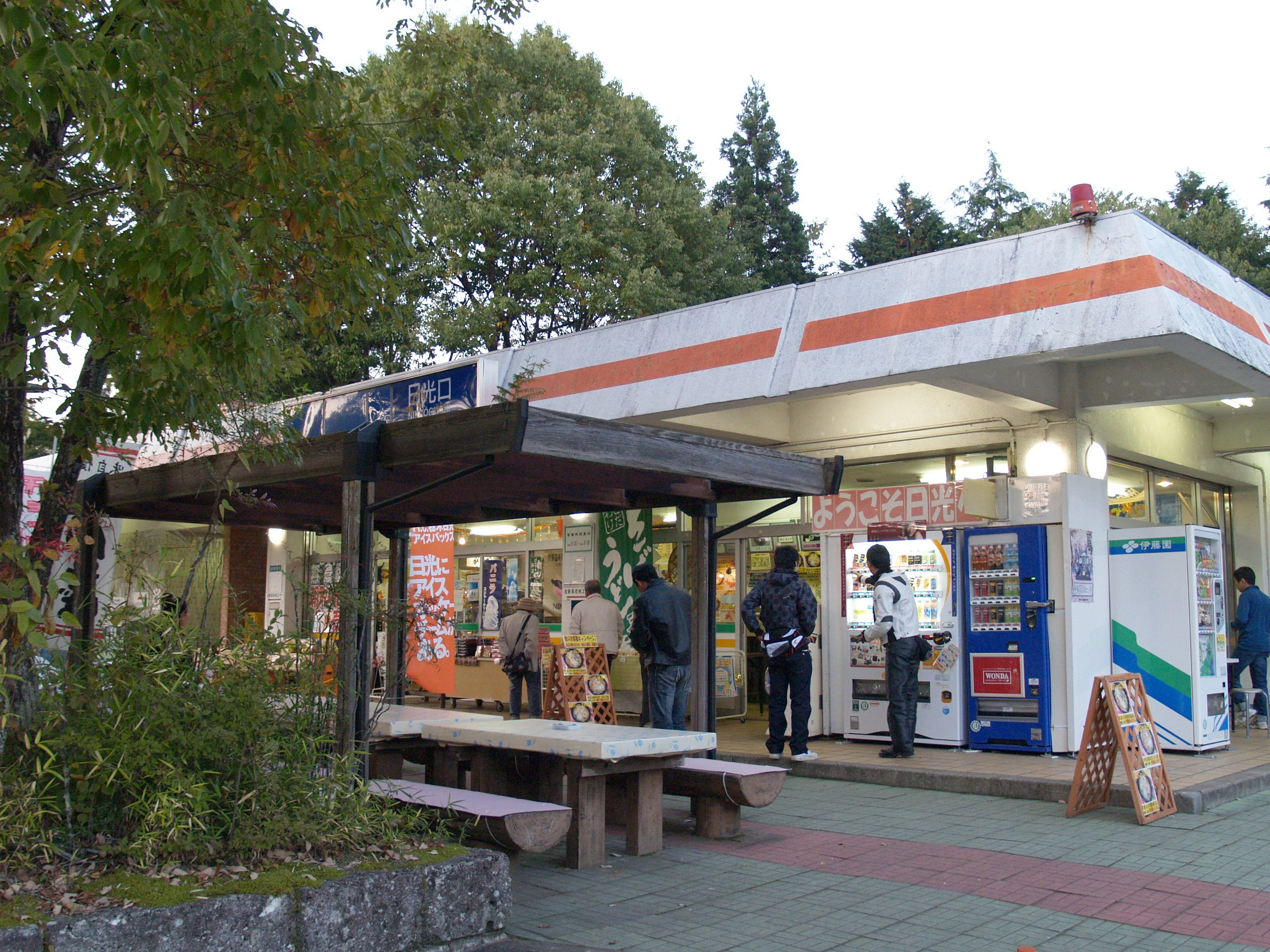 日光口パーキングエリア上り線施設